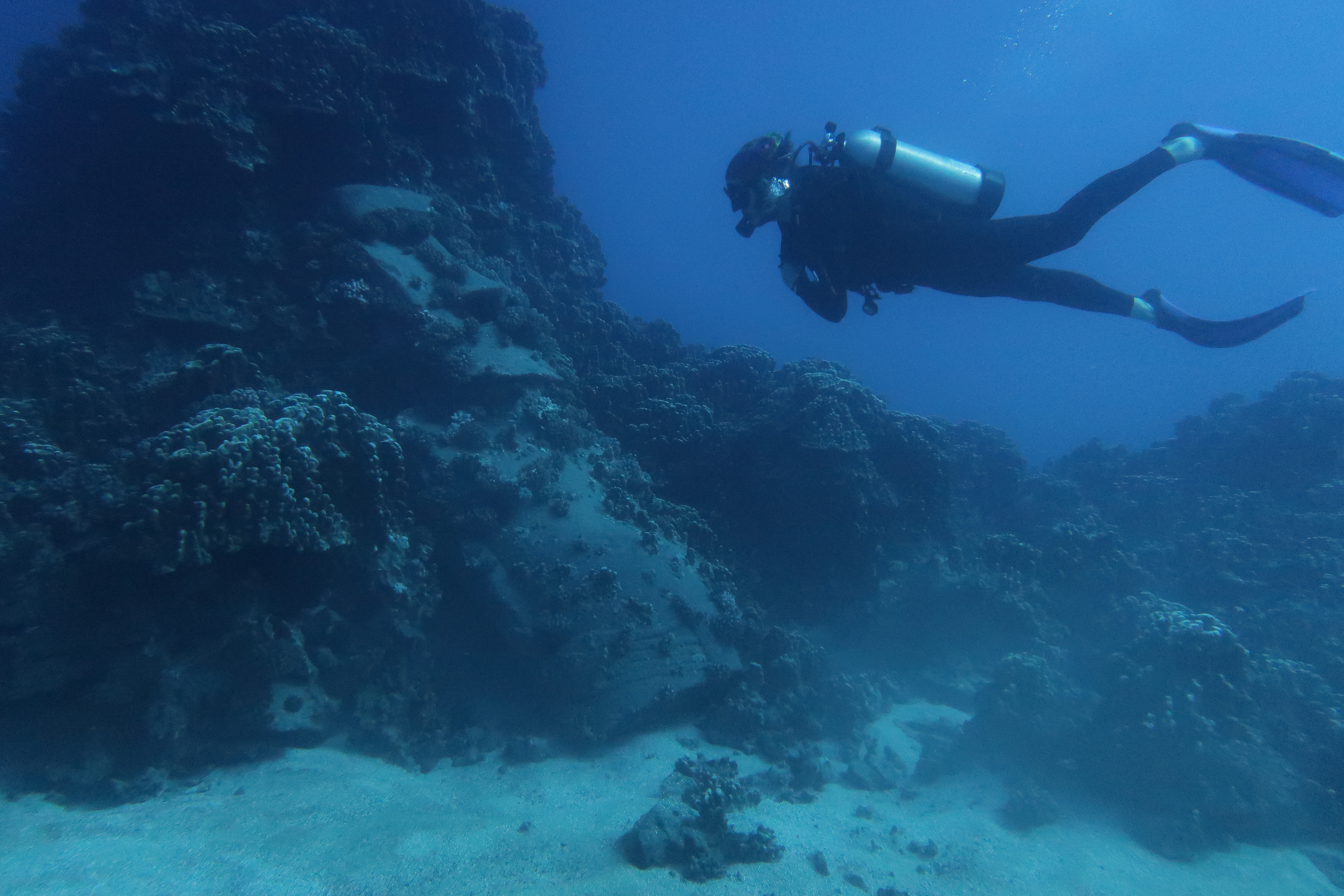 צלילה סמוך לפסל המואי השקוע